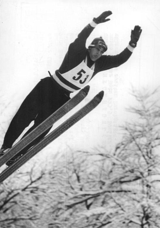 Zentralbild Leipzig-Wlocka 18.2.1957 Werner Lesser II wurde DDR-Meister Ganz kurzfristig waren für den 17.2.1957 die DDR-Meisterschaften im Spezialsprunglauf nach Brotterode angesetzt worden. Auf der Inselbergschanze erkämpfte sich der einheimische Werner Lesser II vor Helmut Recknagel und Harry Glass den Titel. Mit einer Weite von 86m stellte er auch einen neuen Schanzenrekord auf. UBz: Helmut Recknagel (SC Motor Zella-Mehlis) wurde mir der Note 223,5 Zweiter. Recknagel während des zweiten Durchganges.